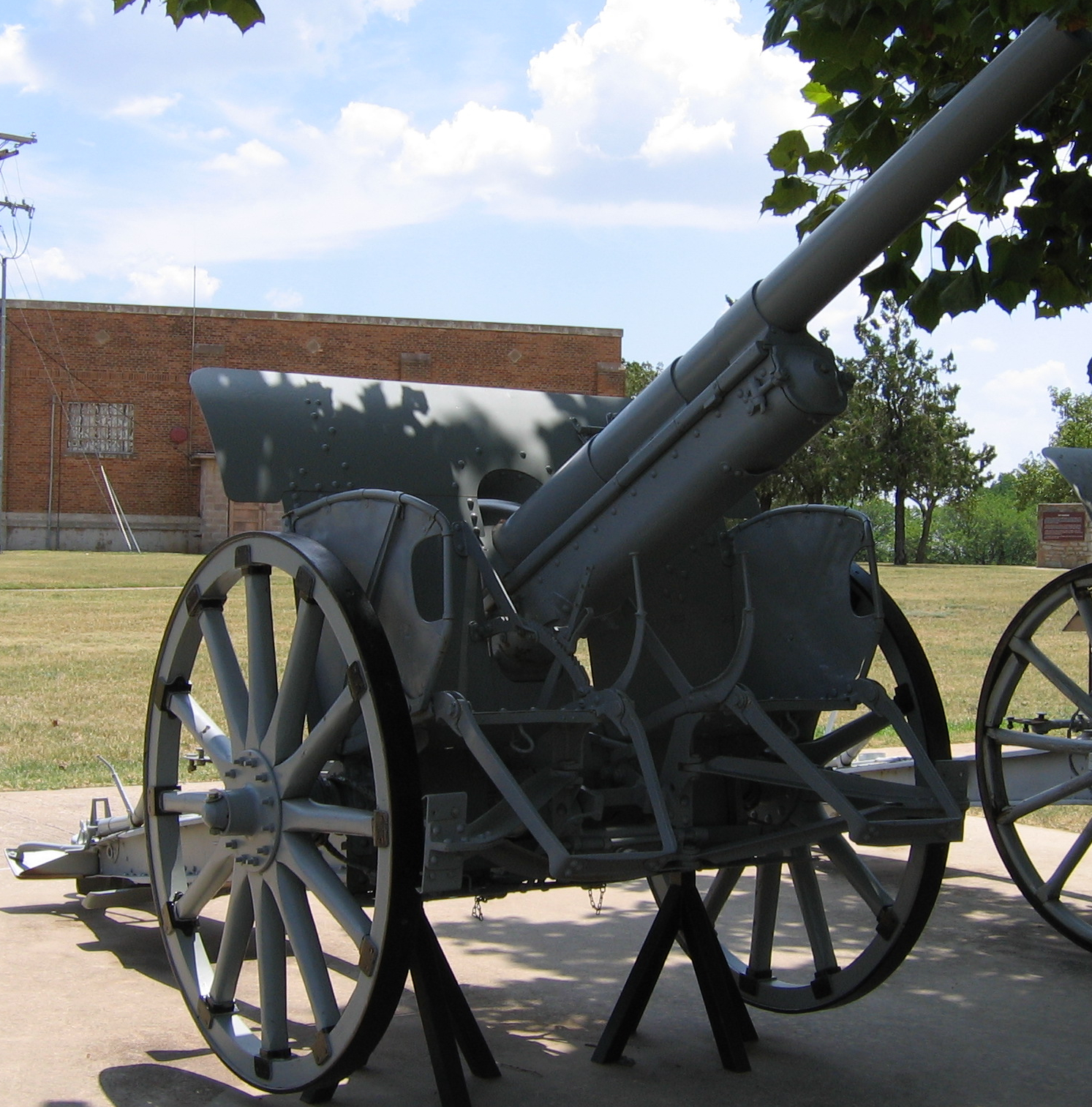 7.5cm FK 16 nA。防盾前部に、牽引時に砲手が座るための簡易座席がある。. Front view of German 75mm Feldkanone 16 nA (FK 16 nA) of WWII at the U.S. Army Field Artillery Museum, Ft. Sill, OK